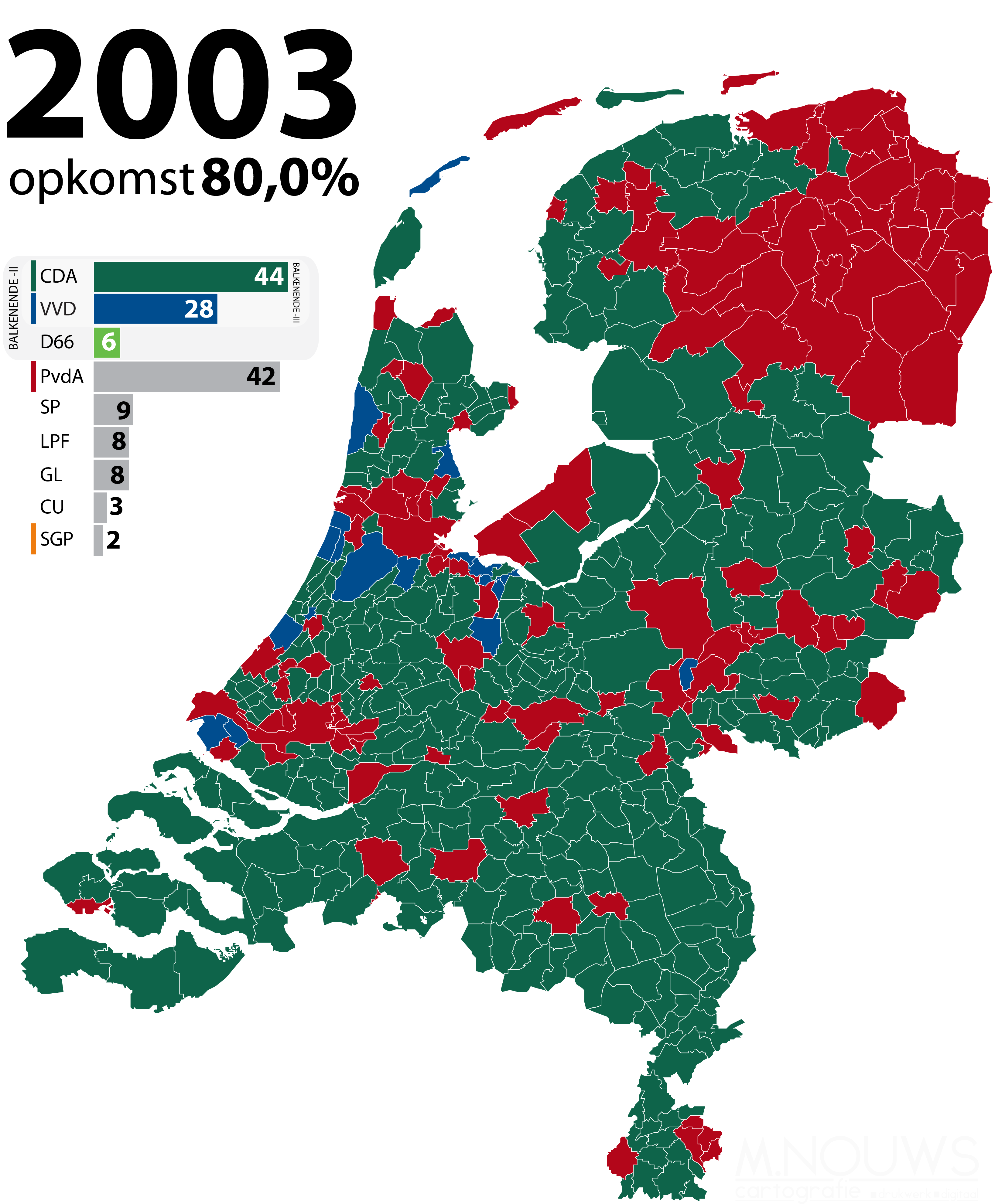 Grootste politieke partij per gemeente, zetelverdeling en kabinetscoalitie bij Tweede Kamerverkiezingen 2003